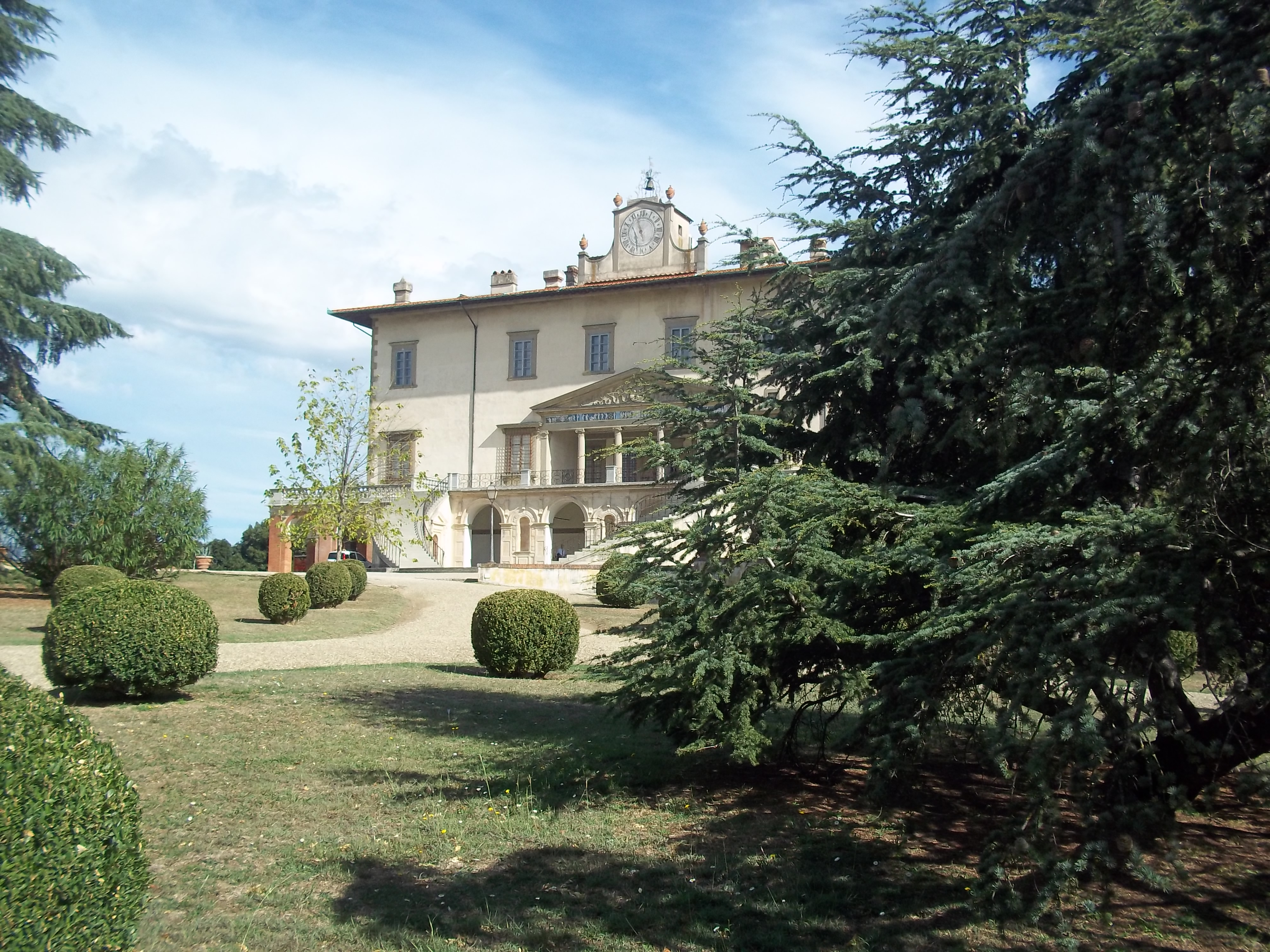 Villa medicea di Poggio a Caiano - MIBAC This is a photo of a monument which is part of cultural heritage of Italy.